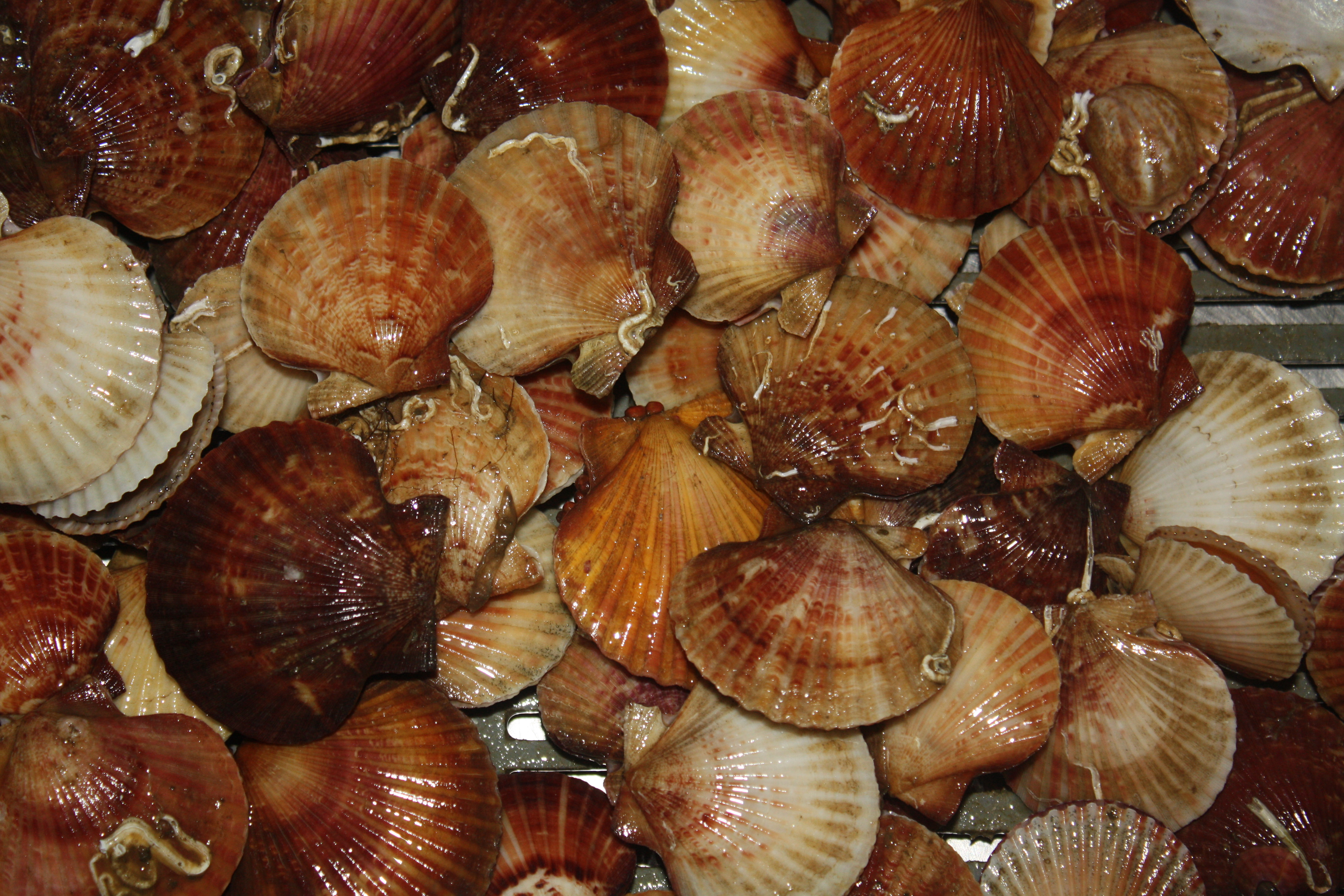 Volandeiras (Aequipecten opercularis)